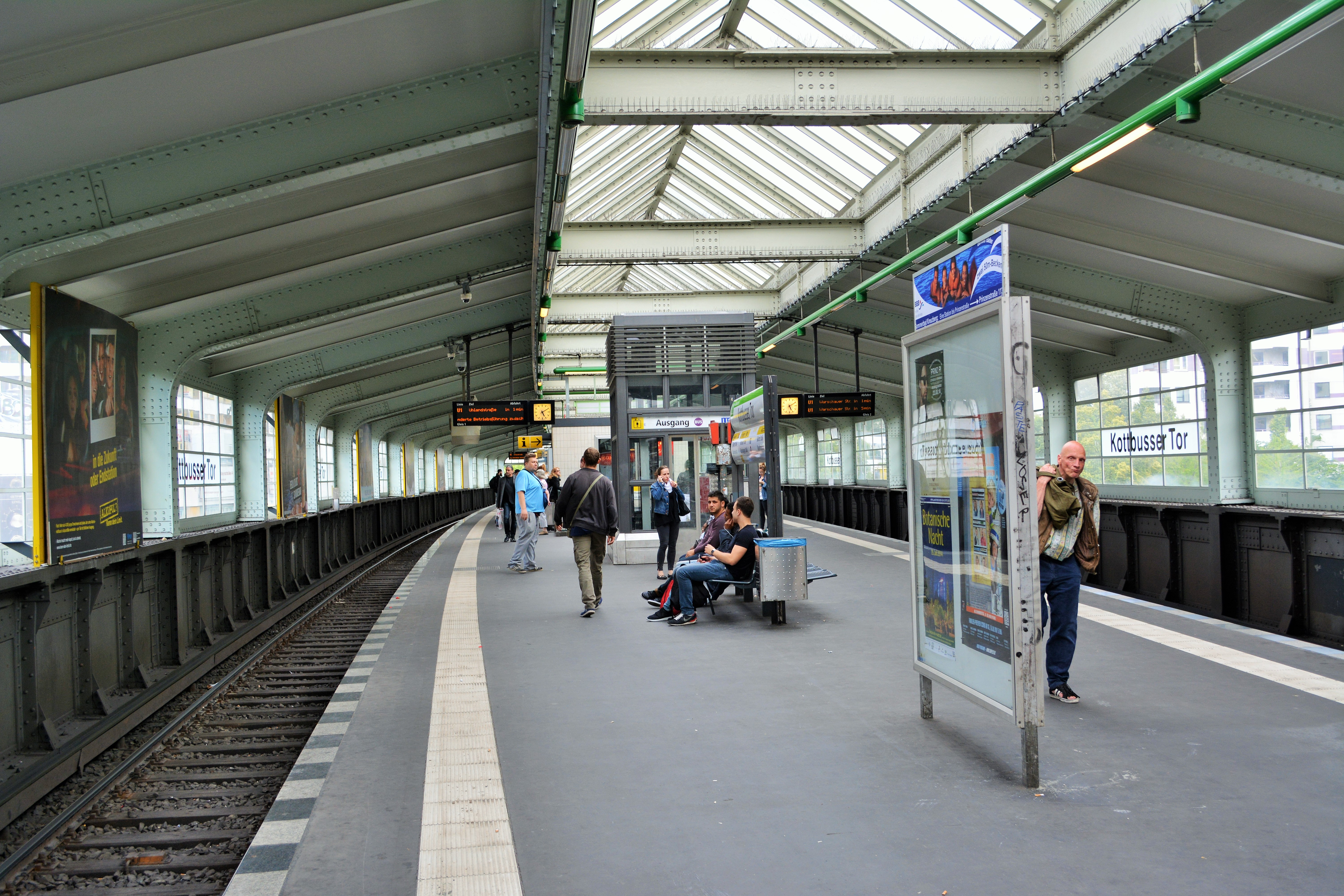 Denkmalgeschützter Hochbahnhof der U-Bahnstation Kottbuser Tor auf den Linien U1 und U8, erbaut 1898-1901